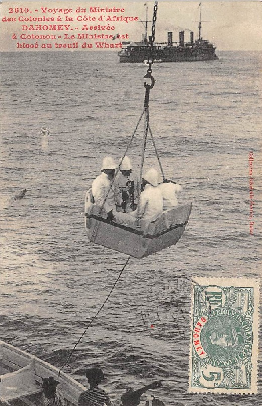 Carte postale - 2610 - Voyage du ministre des colonies à la côte d'Afrique - Dahomey